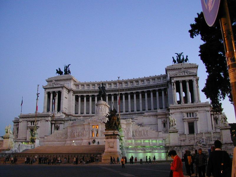 Roma, Vittoriano at dusk